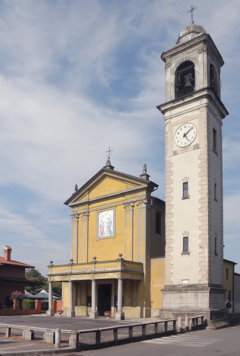 La chiesa parrocchiale dei SS. Giacomo Maggiore Apostolo e Cristoforo Martire a Cerro al Lambro.